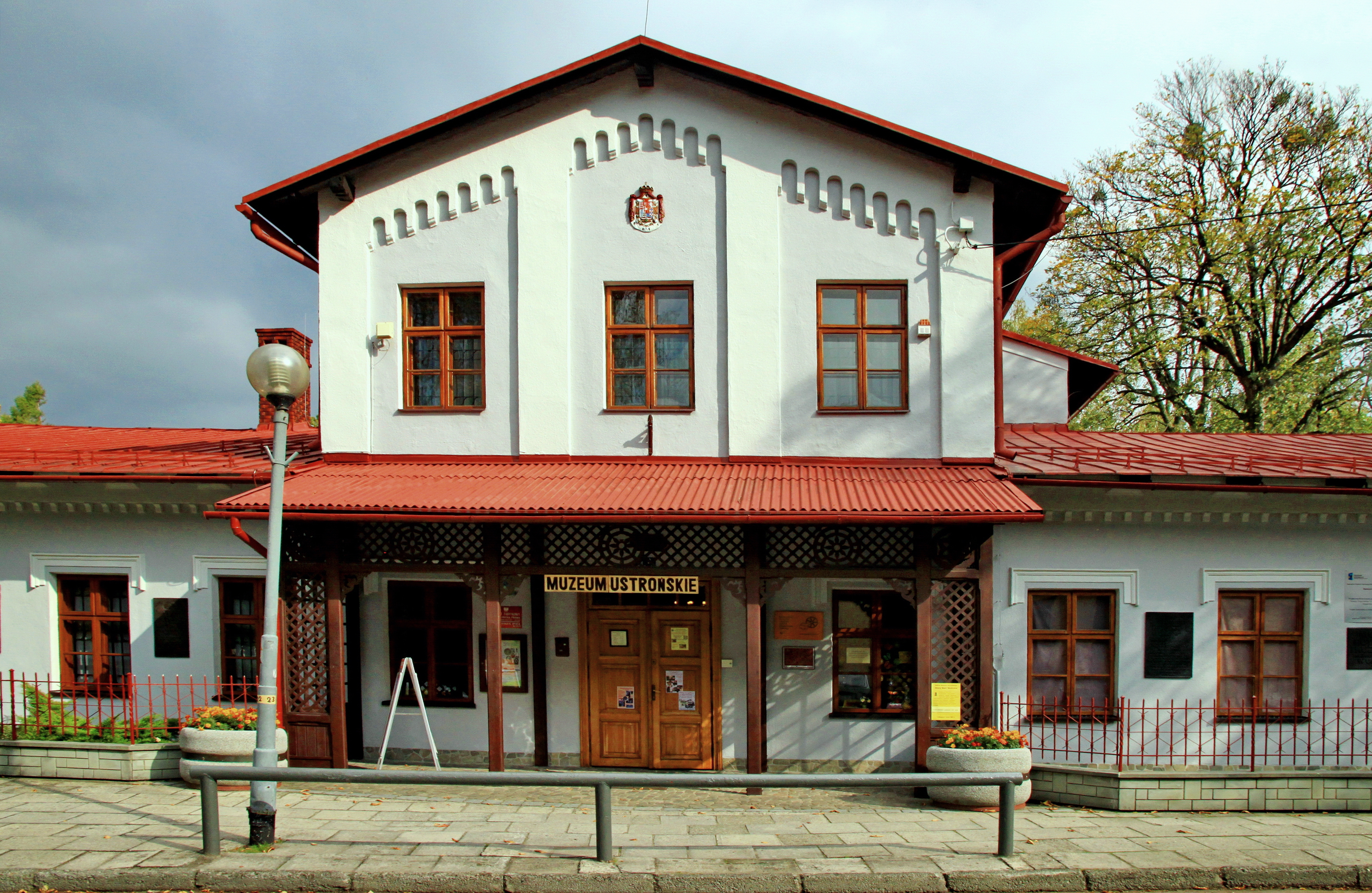 Ustroń, zespół dawnej huty "Klemens", obecnie Muzeum Ustrońskie, budynek administracyjny, 1868 r.